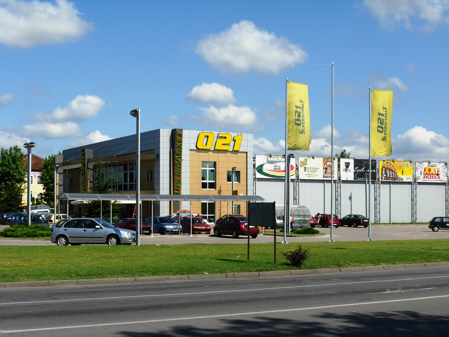 Market Univerexport 021 u Novom Sadu.